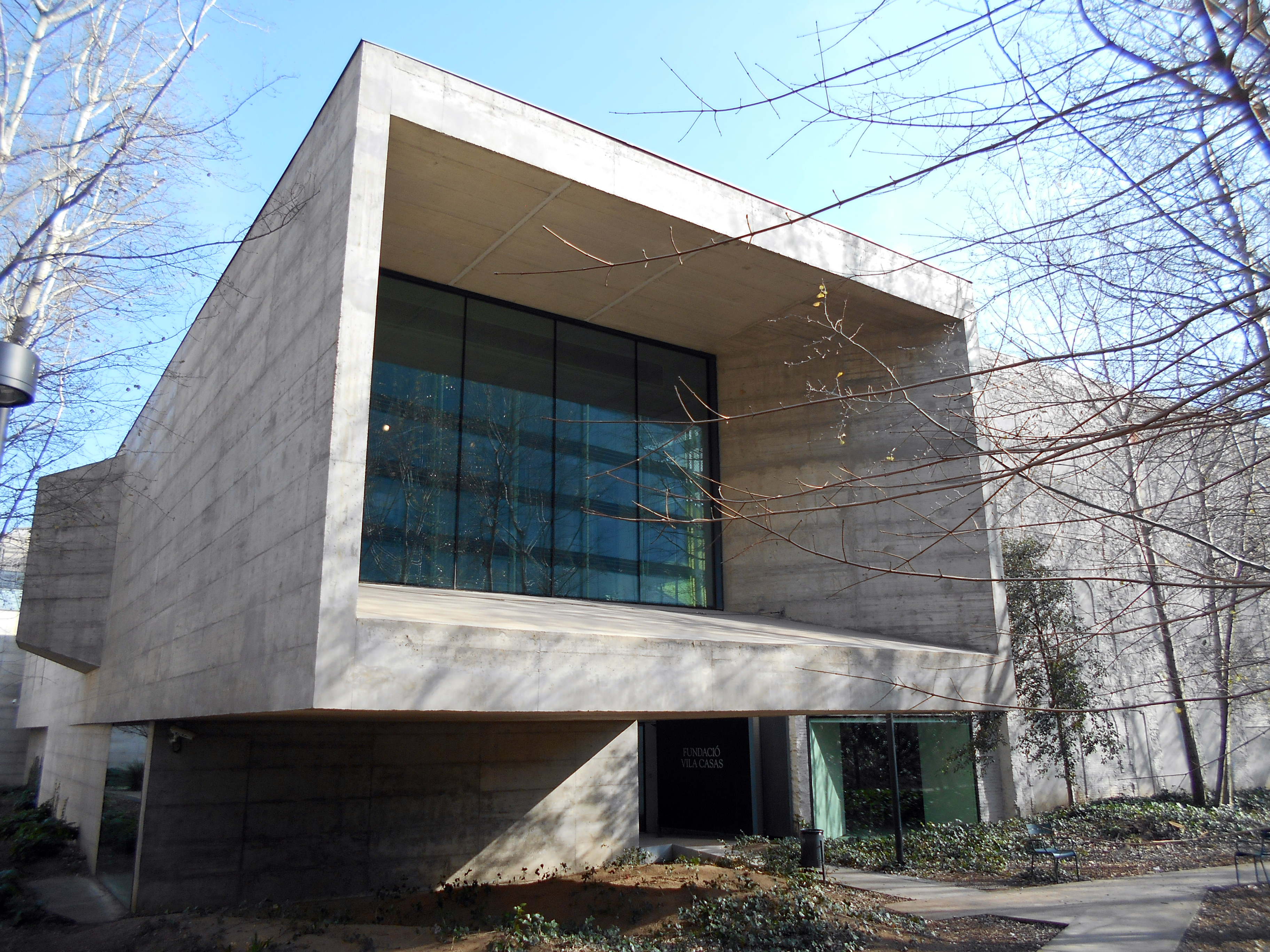 Can Framis.